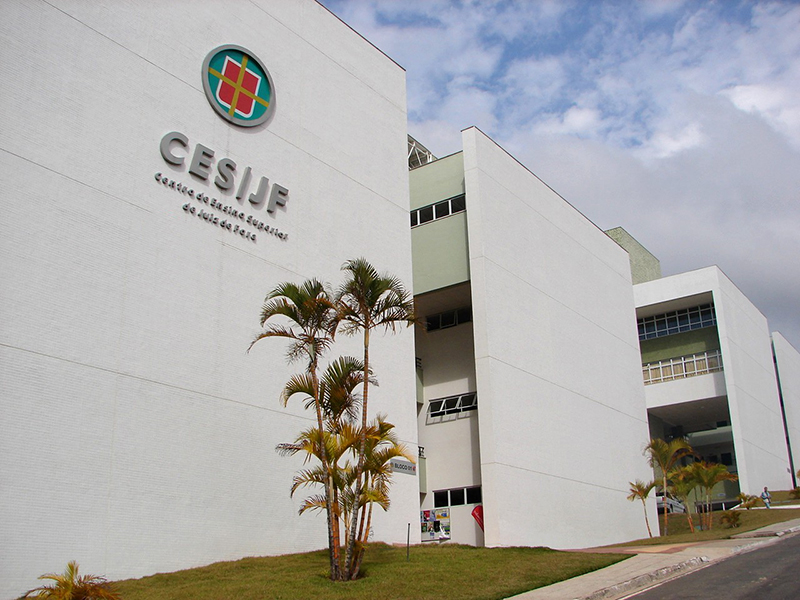 Campus Arnaldo Jensen CESJF